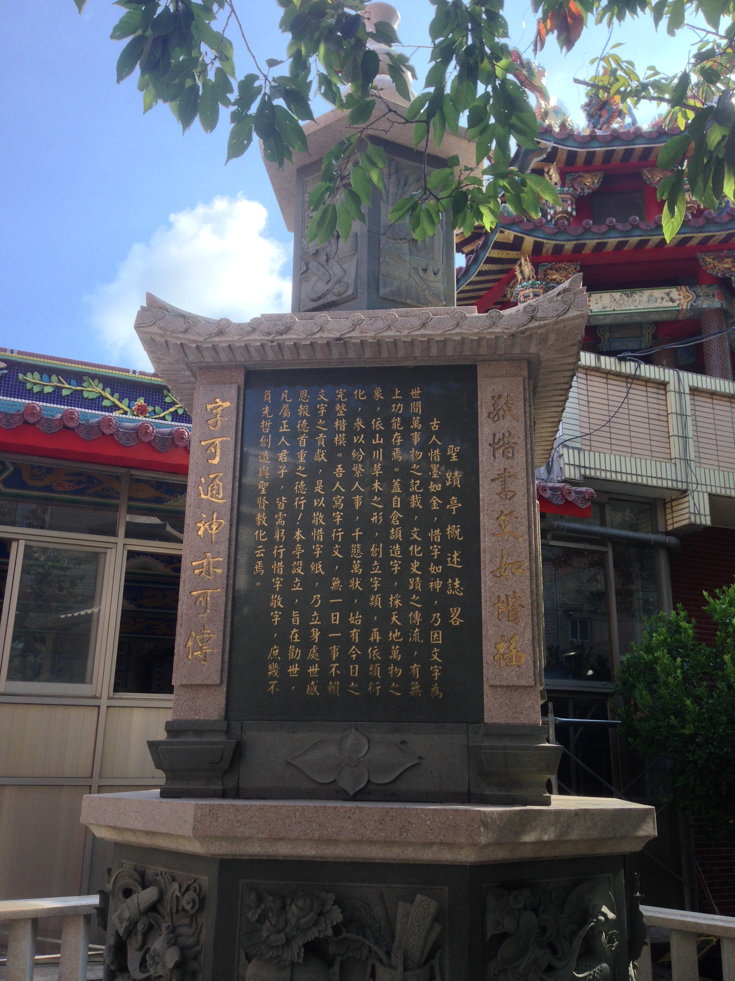 中文（台灣）: 坪頂大湖福德宮聖蹟亭